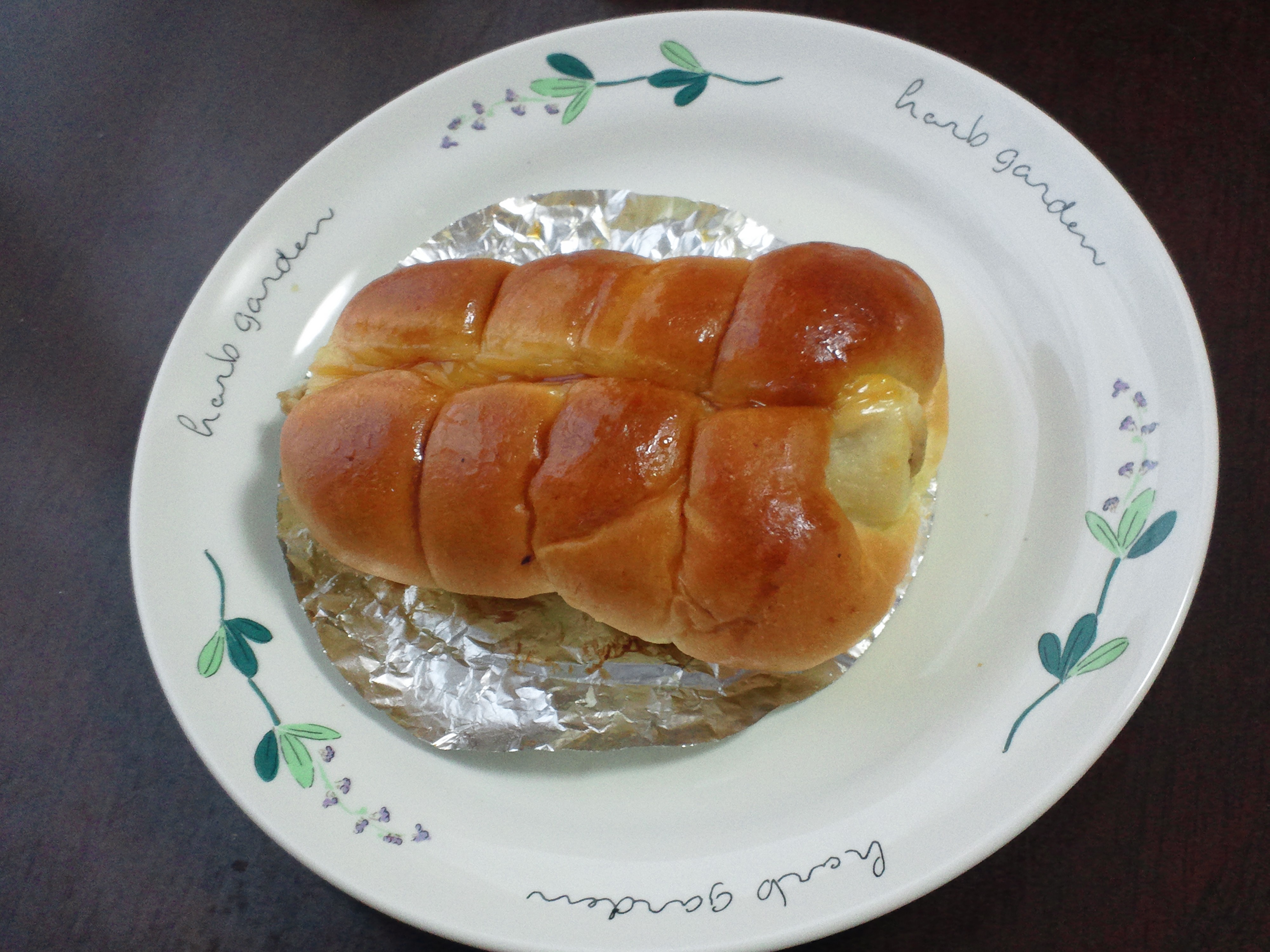 どんぐり発祥のちくわパン